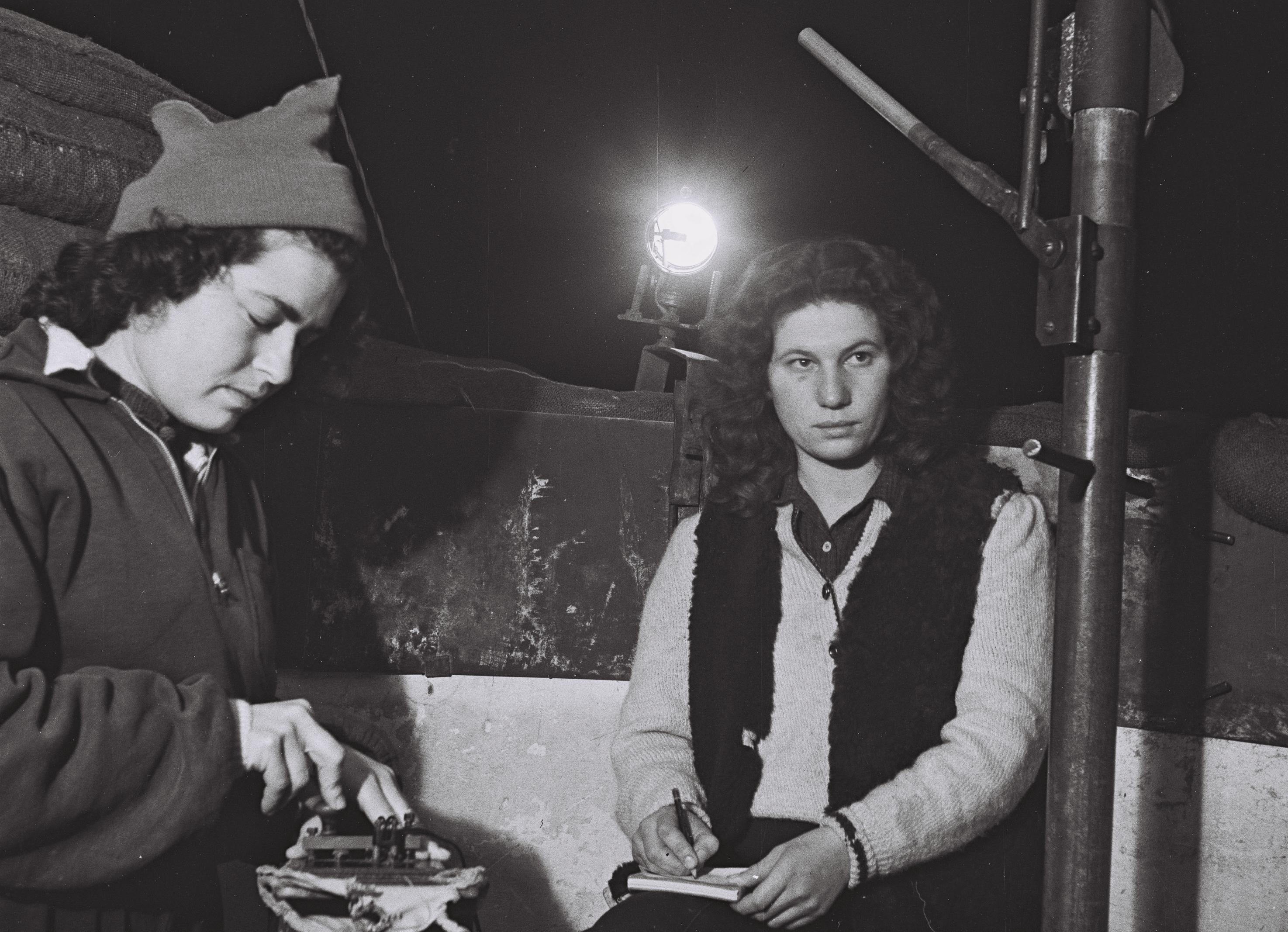 HAGANA WIRELESS OPERATORS WORKING IN THE WATCH TOWER AT GNIGAR. חברות הגנה מפעילות רדיו חשאי במגדל בגניגר